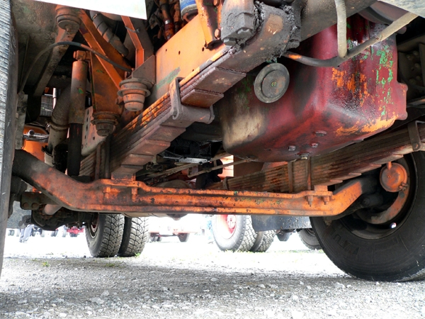 Передний мост автомобиля Magirus-Deutz